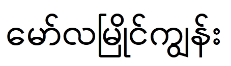 Моламьяйнджун